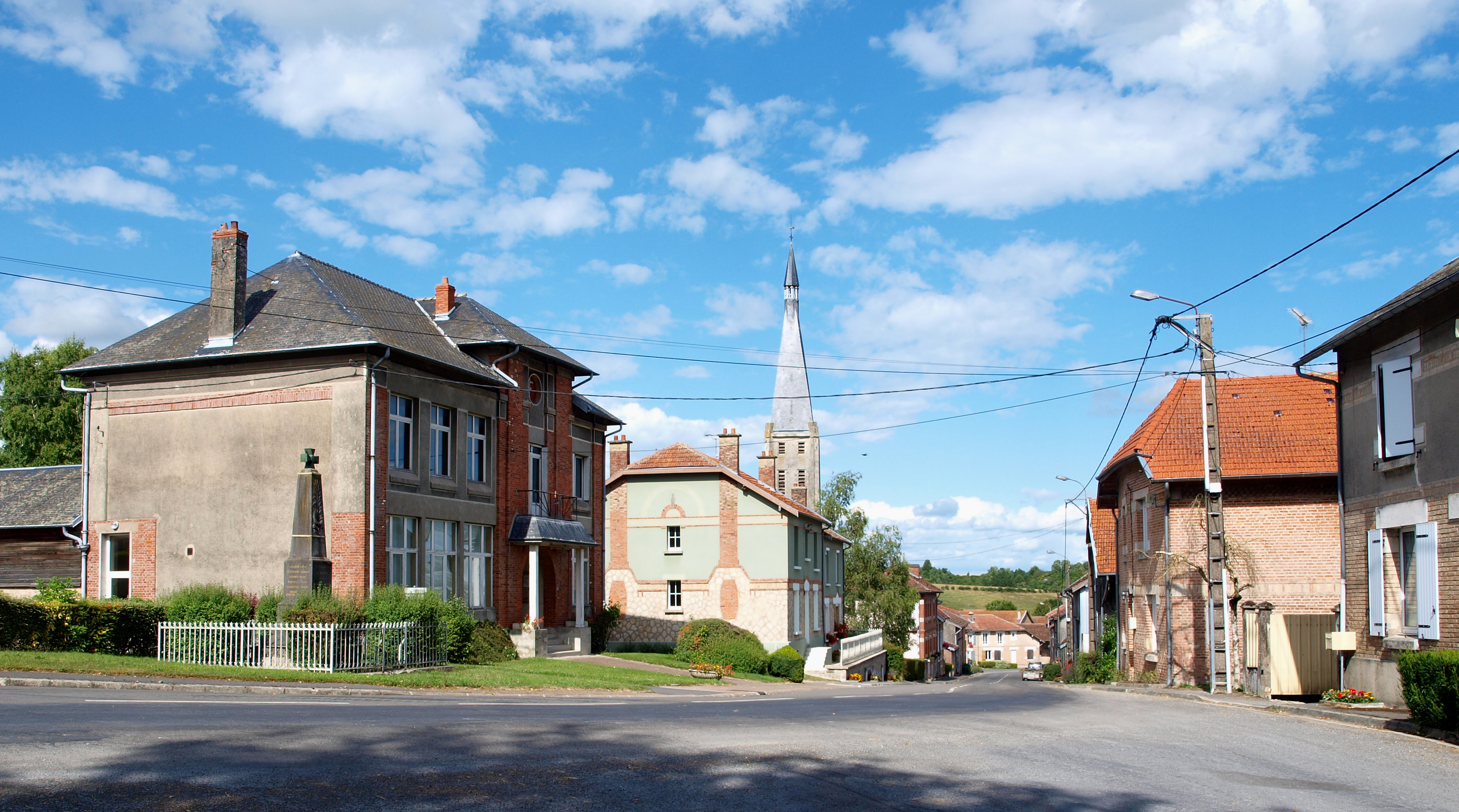 Manre (Ardennes, France) ; vue d'ensemble